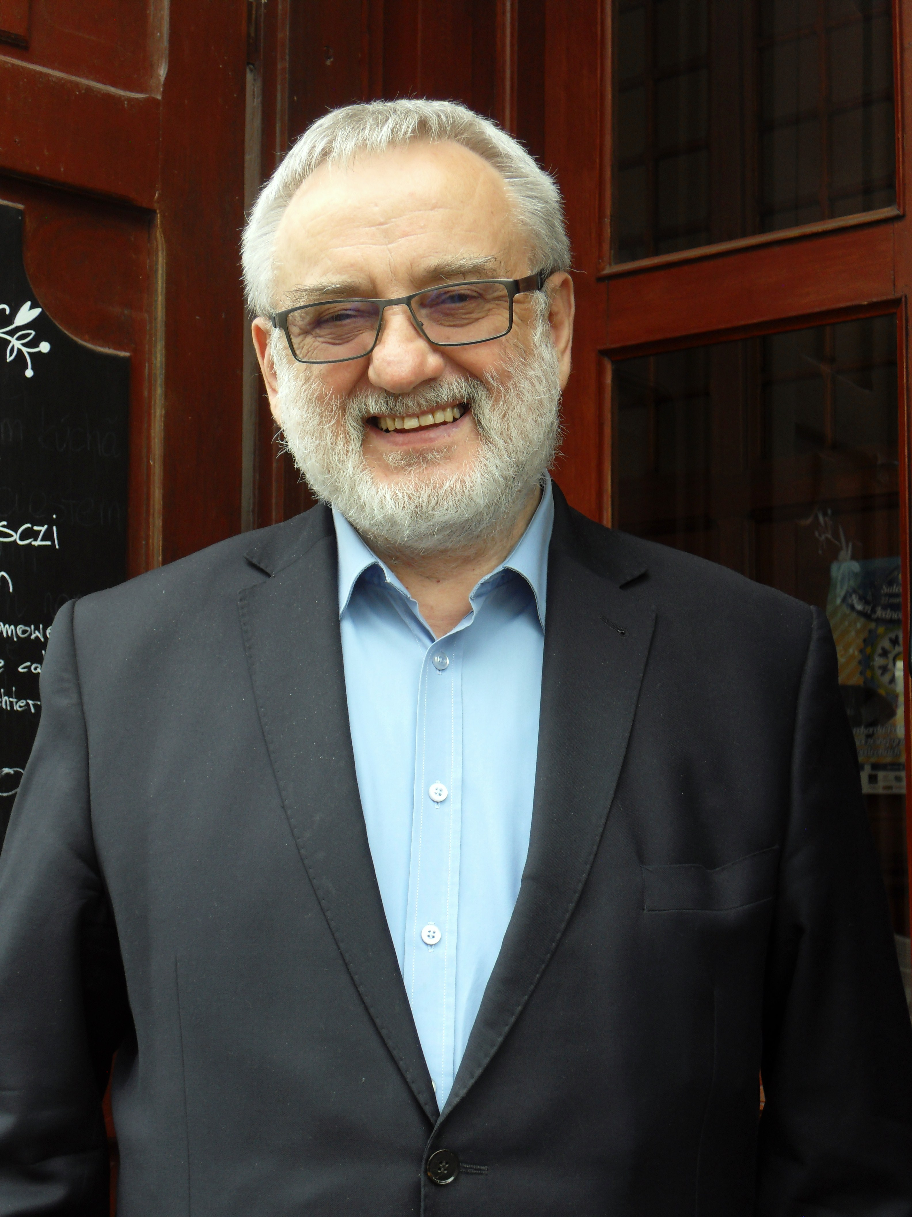 Józef Borzyszkowski, profesor nauk humanistycznych.